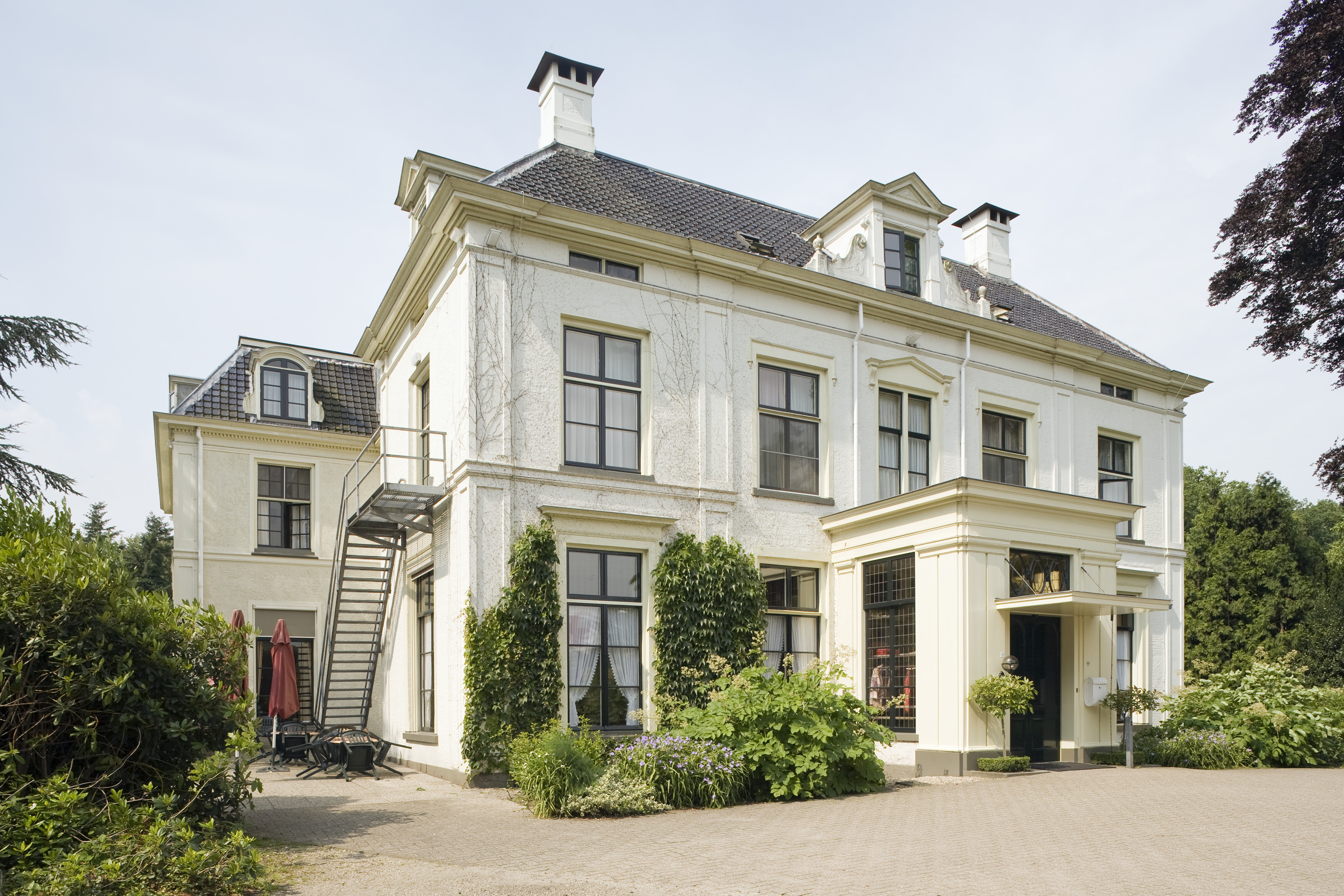 IJsselvliedt: Overzicht van de voorgevel van het landhuis met portiek